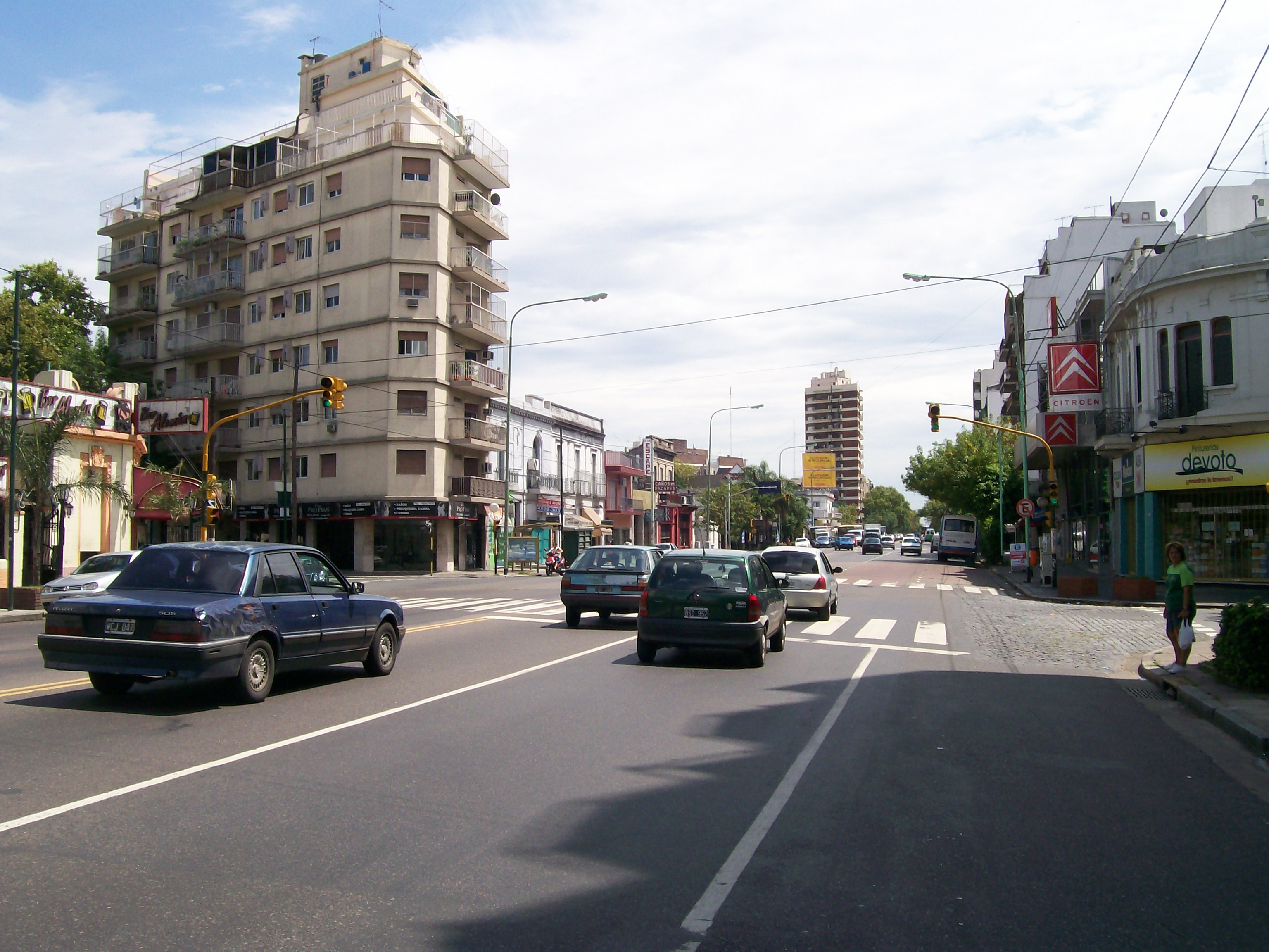 Avenida San Martín Alt calle Pedro Morán